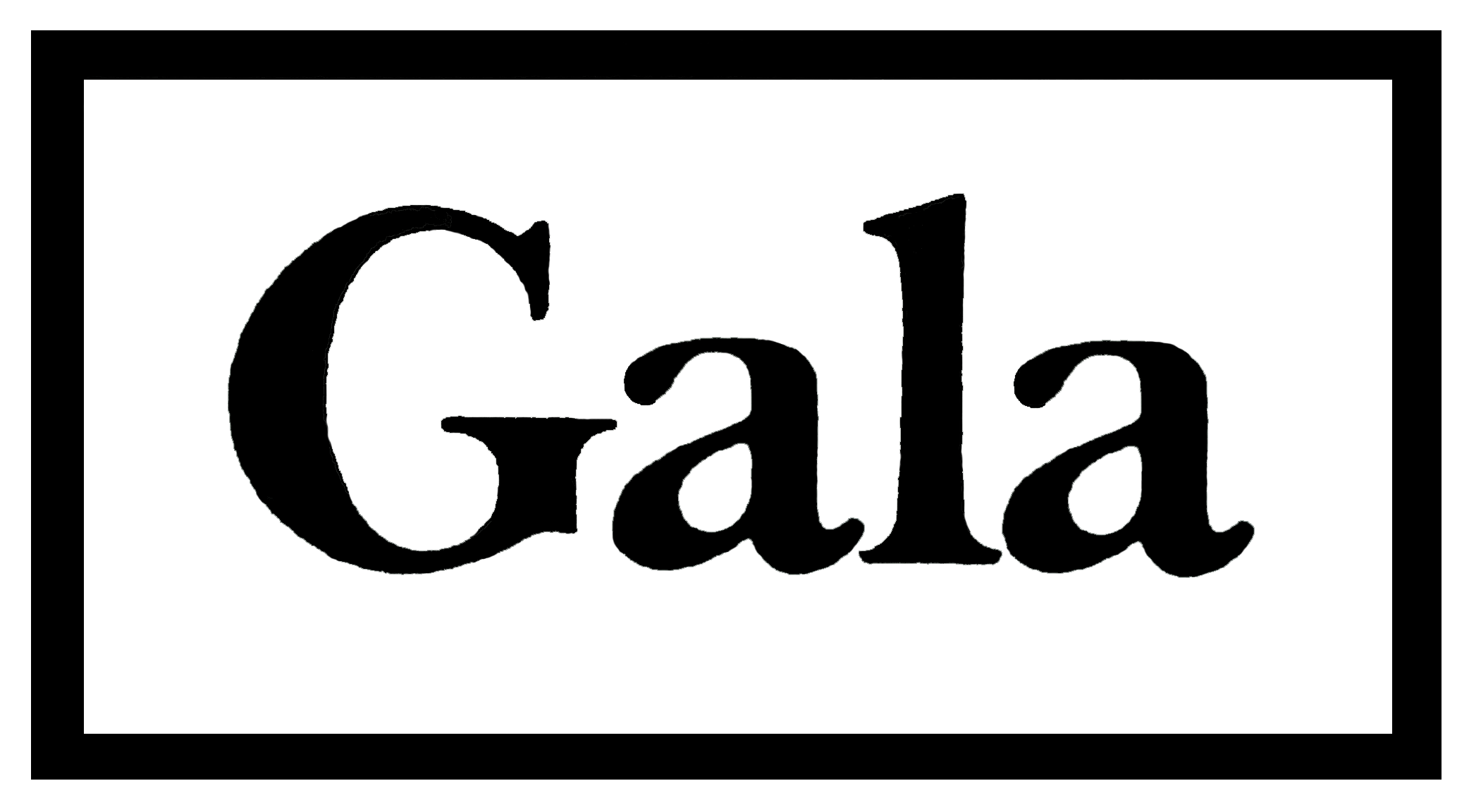 Logotipo de "Gala", cadena difunta de tiendas departamentales, anteriormente conocida como "Gala-Sears"